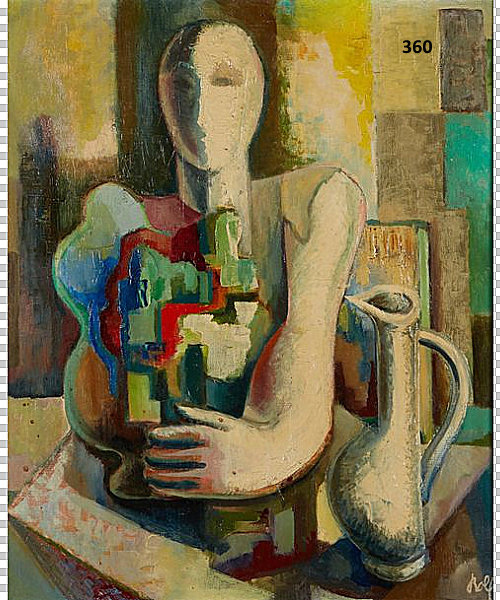 Portrait à la cruche, huile sur toile, 71x58 cm, peinte par l'artiste Rolf Hirschland (1907-1972)